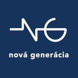 Logo NG